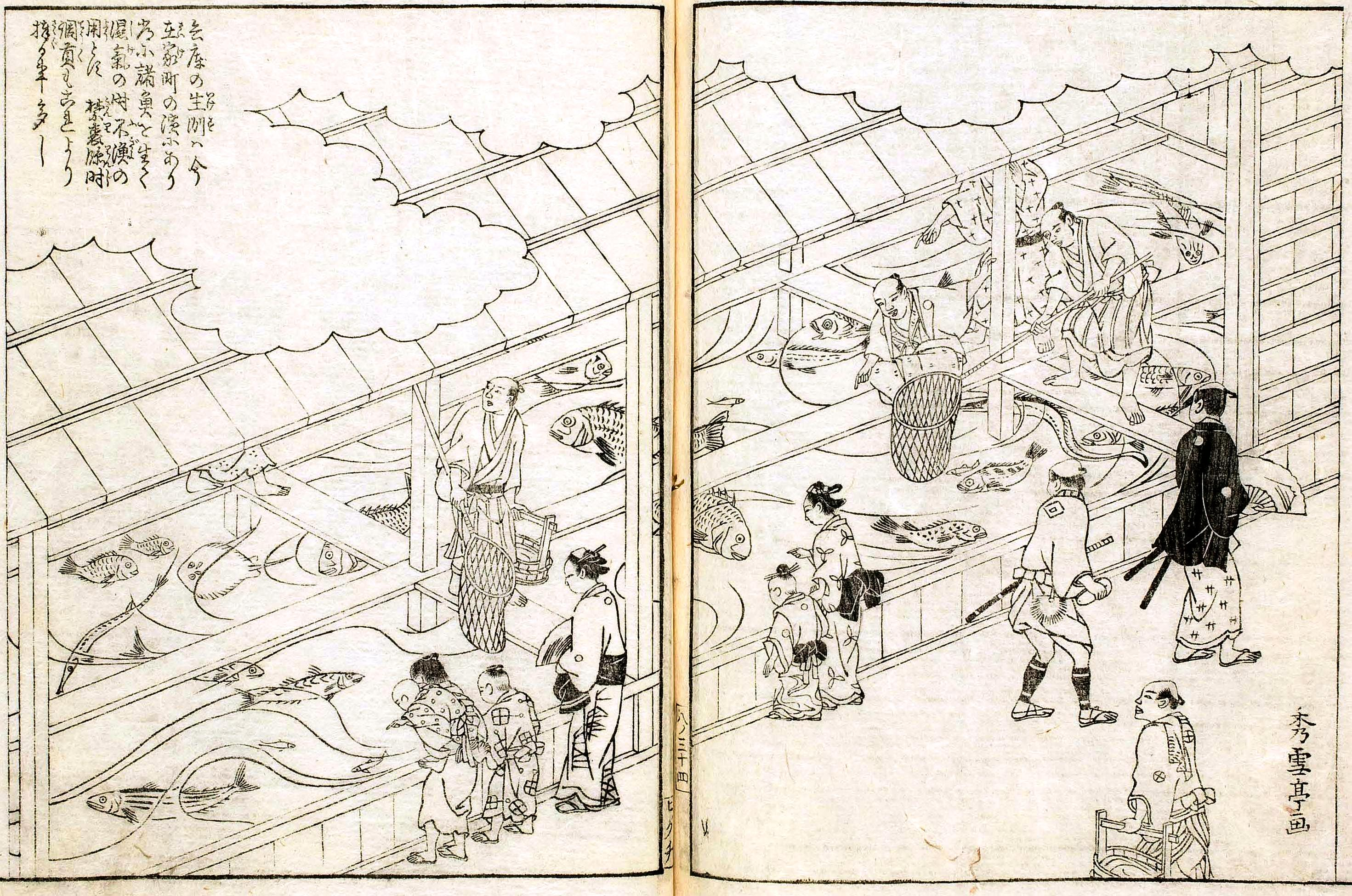 今在家町にあった兵庫生洲（摂津名所図会）。不漁の際に市場に供給すると同時にさまざまな魚を見られる名所となっていた。